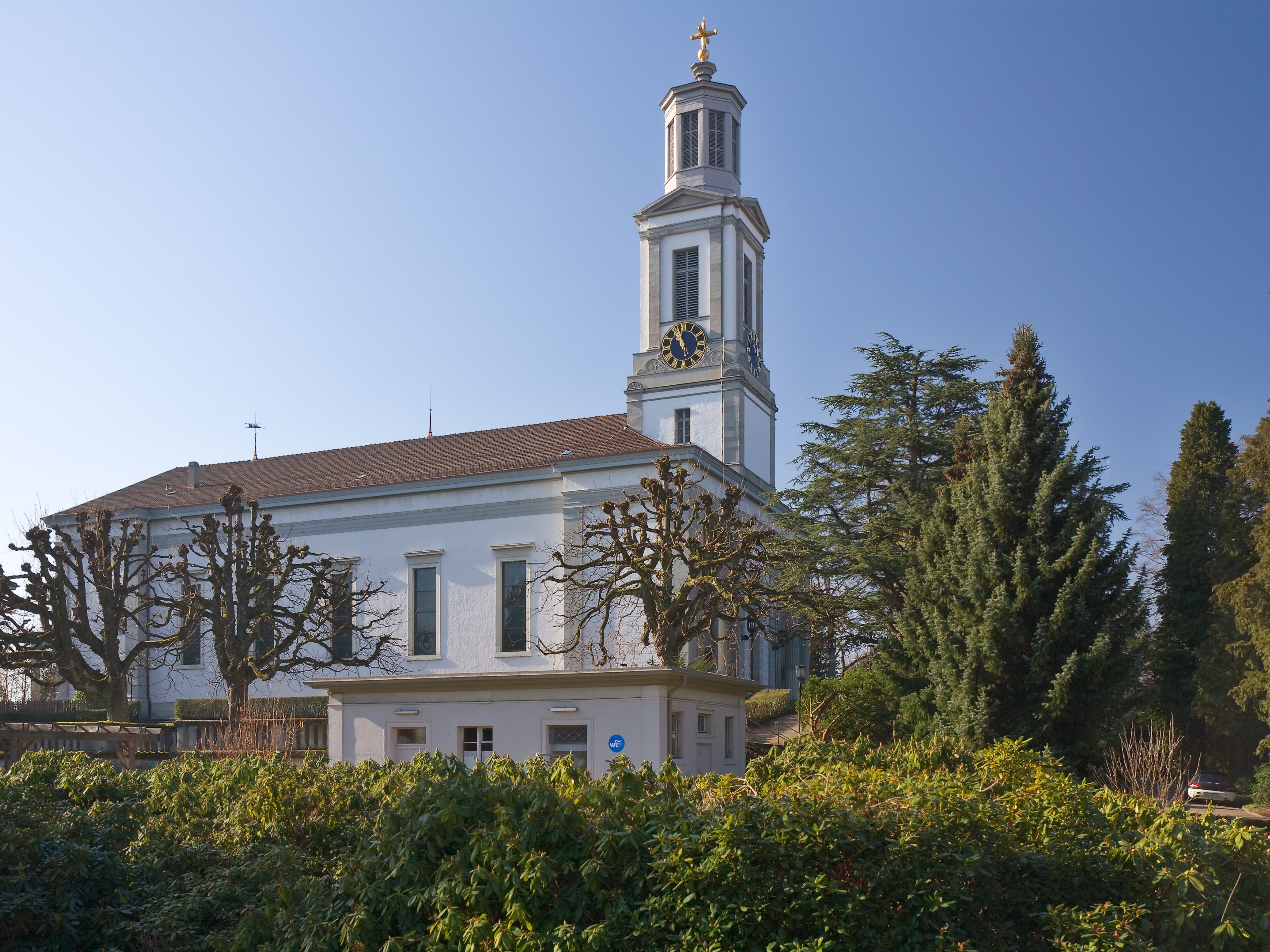 Die Neumünsterkirche in Zürich, SchweizArchitekten Leonhard Zeugheer und A.F. Bluntschli